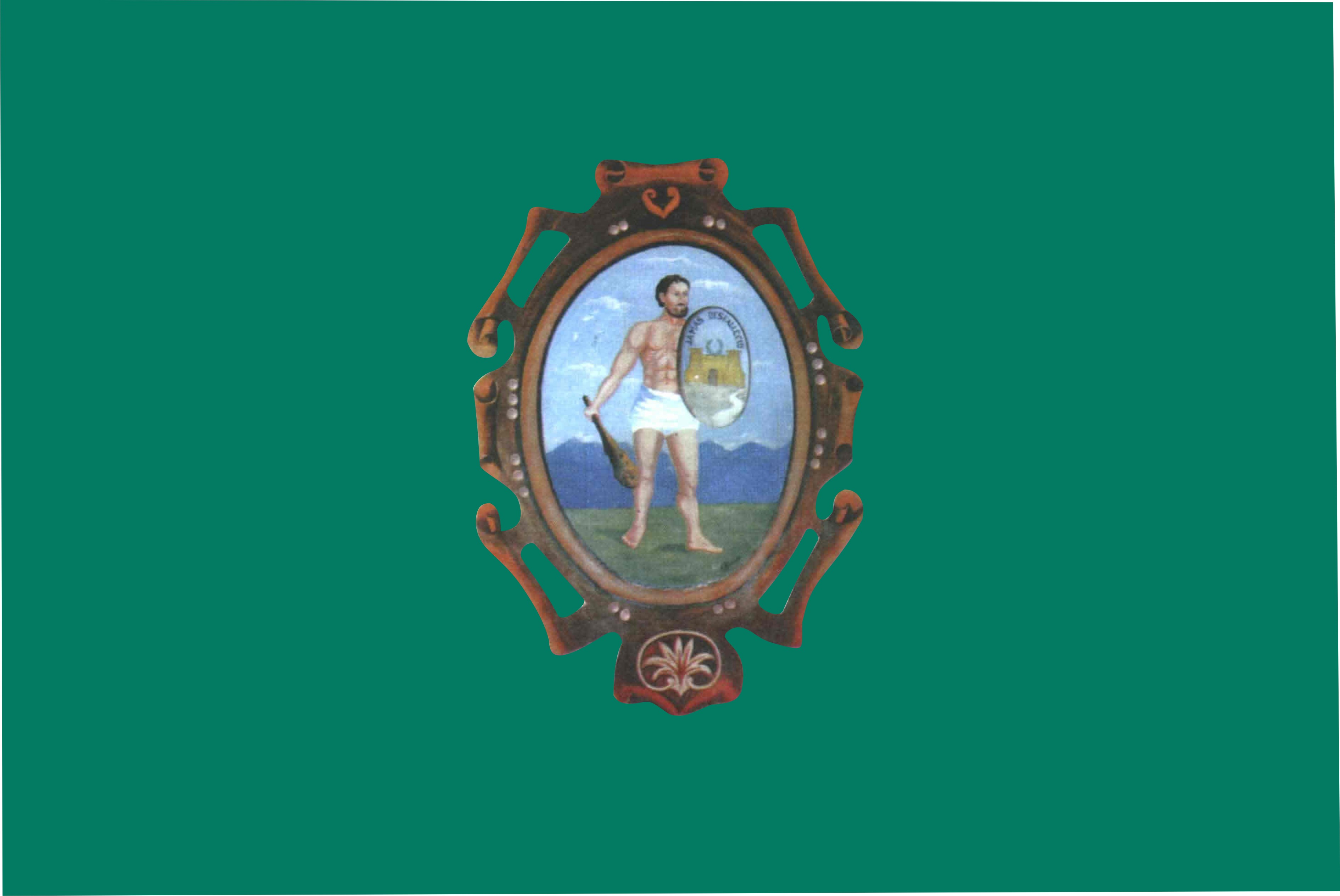 Bandera de la Provincia de Huanta